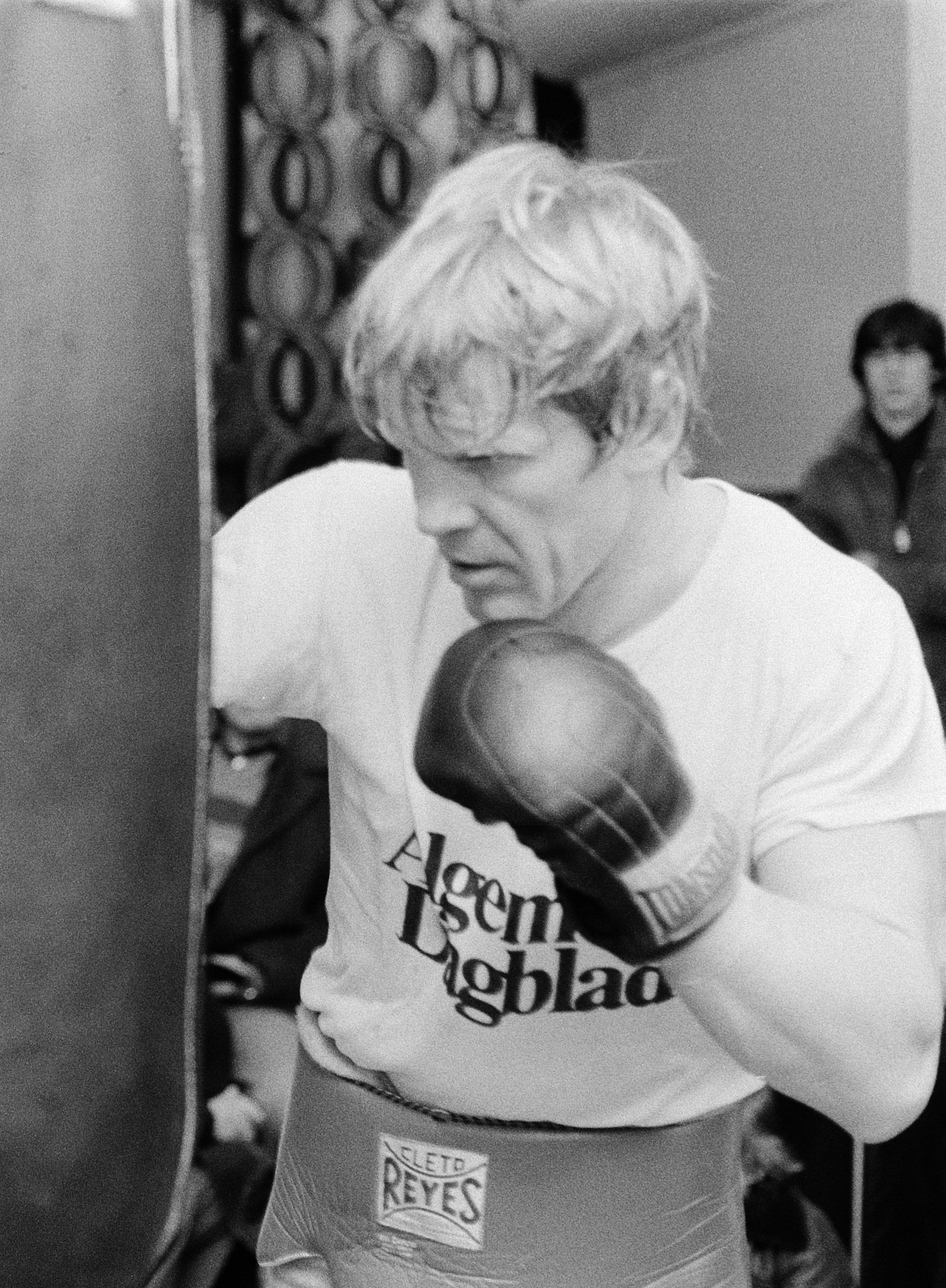 Boksen, training Rudi Koopmans in verband met gevecht o Europese titel halfzwaargewicht tegen Aldo Traversaro